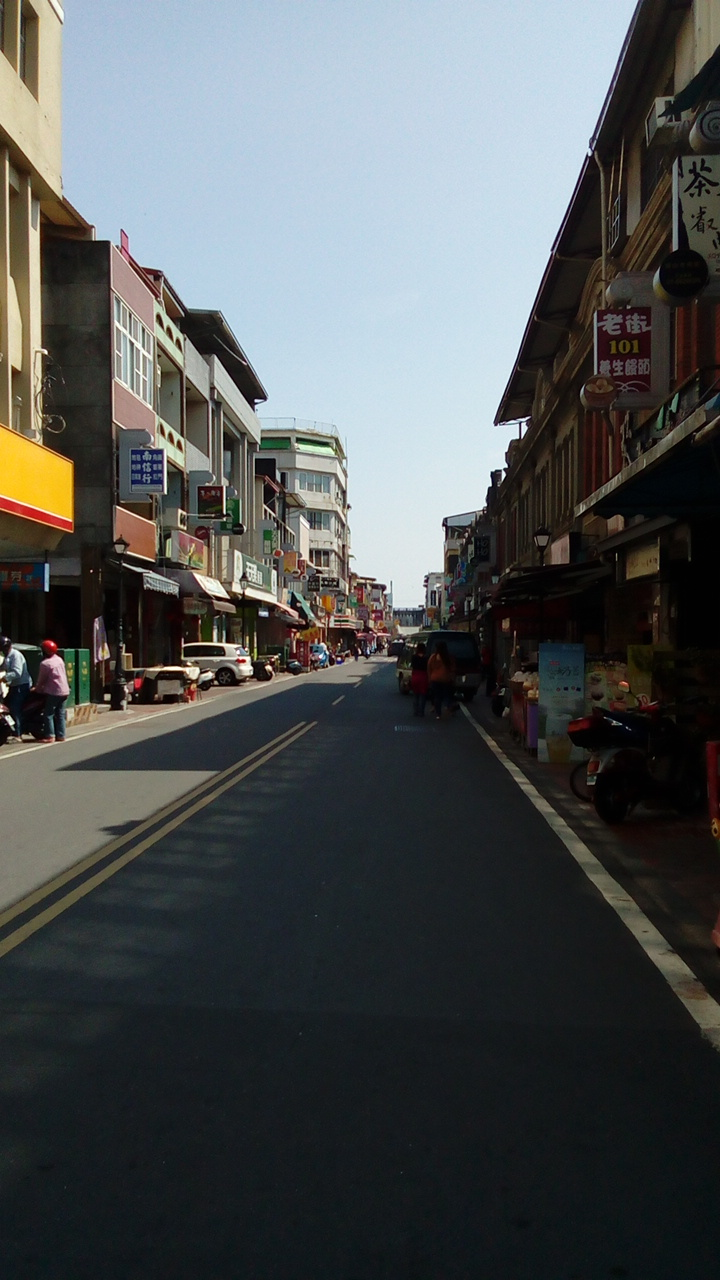 同上